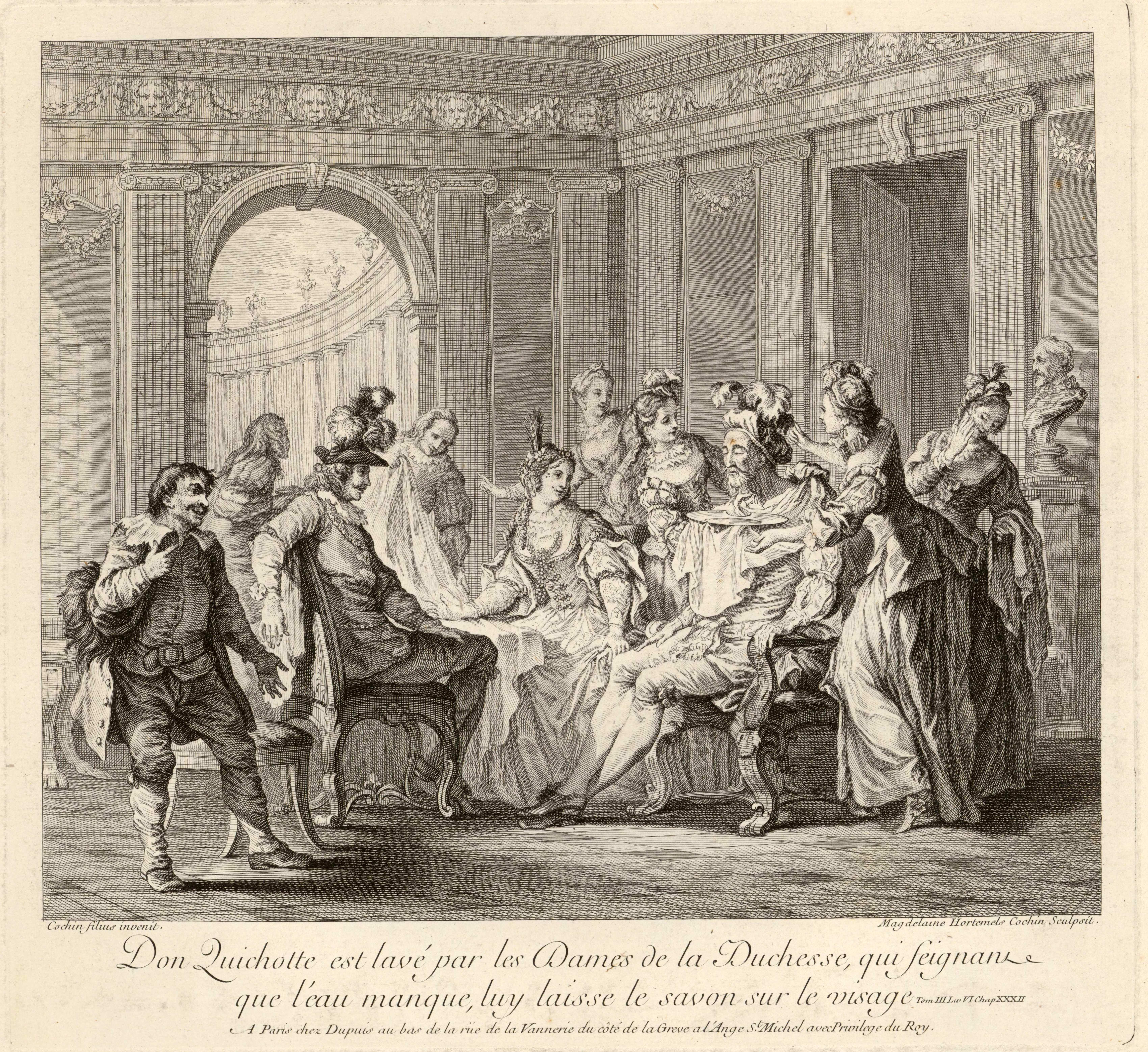 Don Quijote es lavado por las damas de la duquesa, aguafuerte y buril de Louise Madeleine Horthemels Cochin por dibujo de Charles-Nicolas Cochin. Estampa perteneciente a las Aventures de'admirable Don Quijotte. Colección de 25 grabados por dibujos de Charles Coypel publicada en 1724 y posteriormente ampliada con otras seis estampas de diversos autores, Firmada: Cochin filius invenit ; Magdelaine Hortemels Cochin Sculpsit. Biblioteca Nacional de España